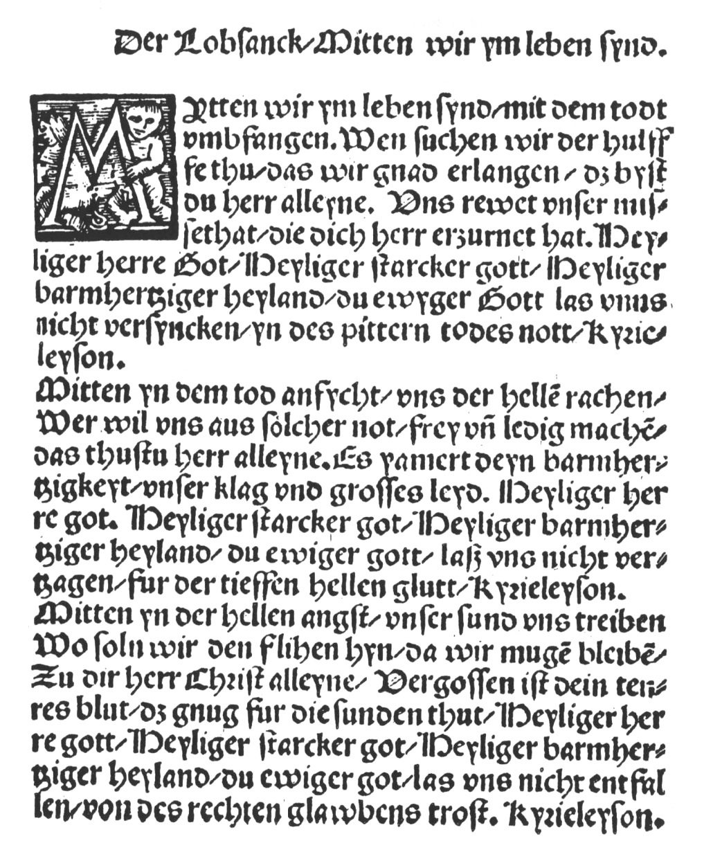 Mitten wir im Leben sind mit dem Tod umfangen, Erfurter Enchiridion 1524